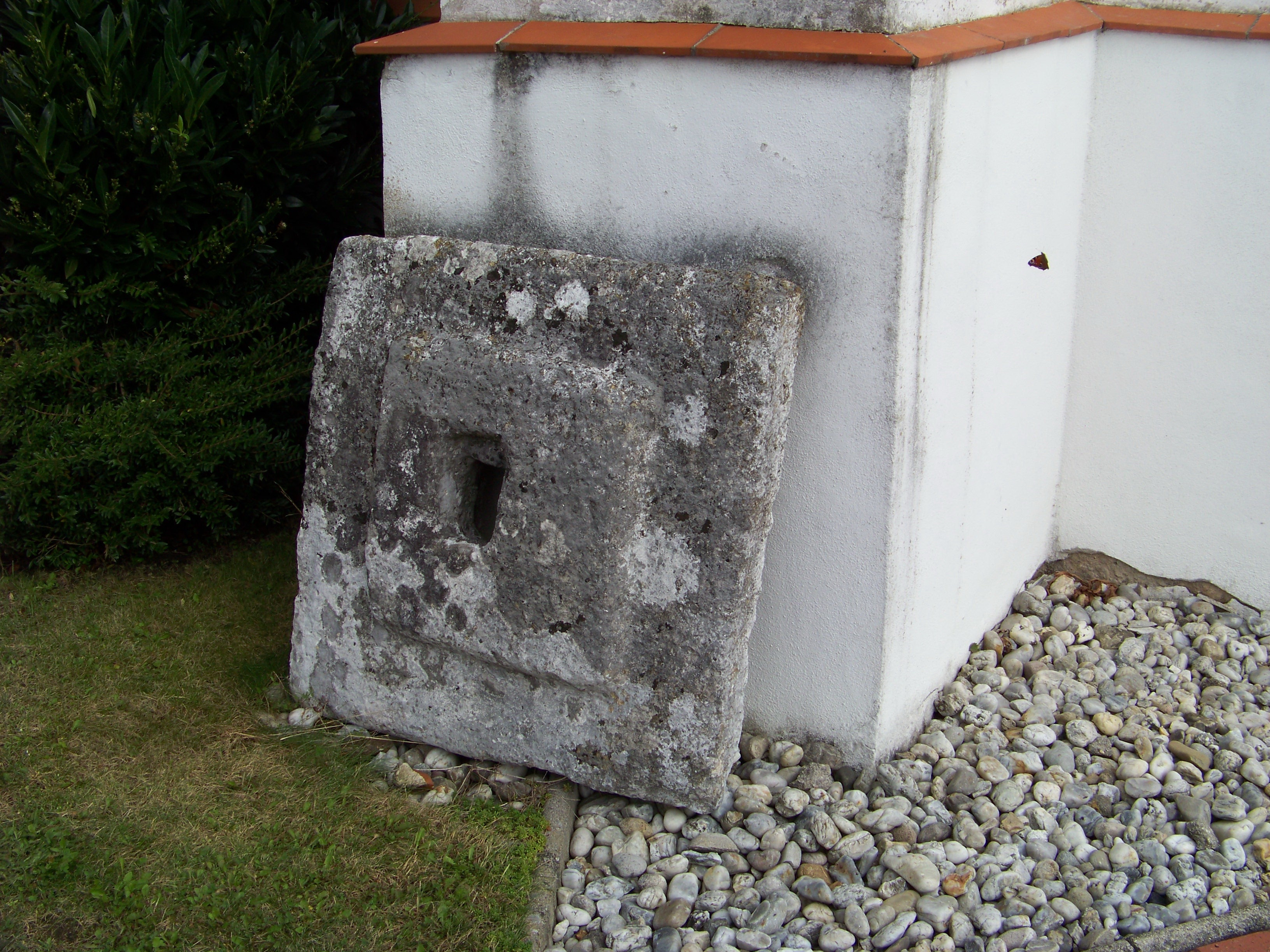 Landshut, Frauenberg 14. Katholische Kirche St. Mariä Heimsuchung. Eine Legende erzählt vom heiligen Erhard, einem Prediger, der Ende des siebten, Anfang des achten Jahrhunderts gelebt hat. Er war auf der Flucht, und musste die Isar überqueren. Mit Hilfe eines flachen Steines war ihm dies scheinbar möglich. Dieser so genannte "Erhardistein" ist außen an einem Eckpfeiler der Kirche zu sehen.